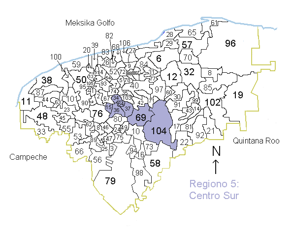 La bildo montras la situon de la regiono 5, Centro Sur en Yucatán Kategorio:Geografio de Yucatán